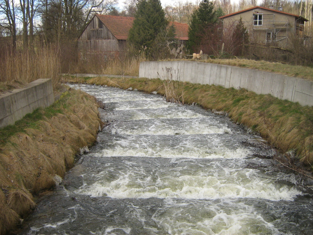 Die „Nonne“ bei Nonnenmühle (Landkreis Mecklenburgische Seenplatte, Mecklenburg-Vorpommern).